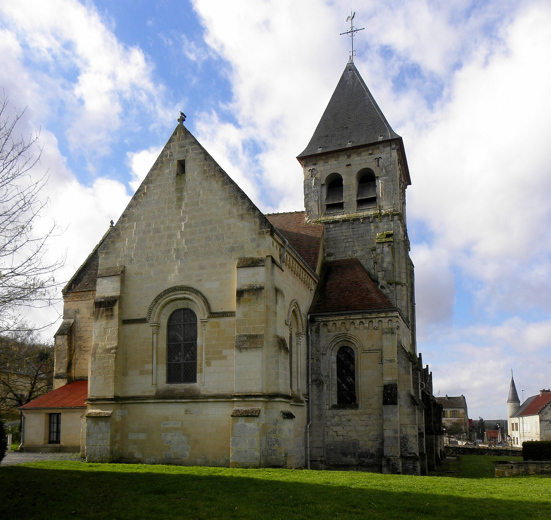 Église Saint-Martin de Bonneuil-en-Valois (60). Chevet.